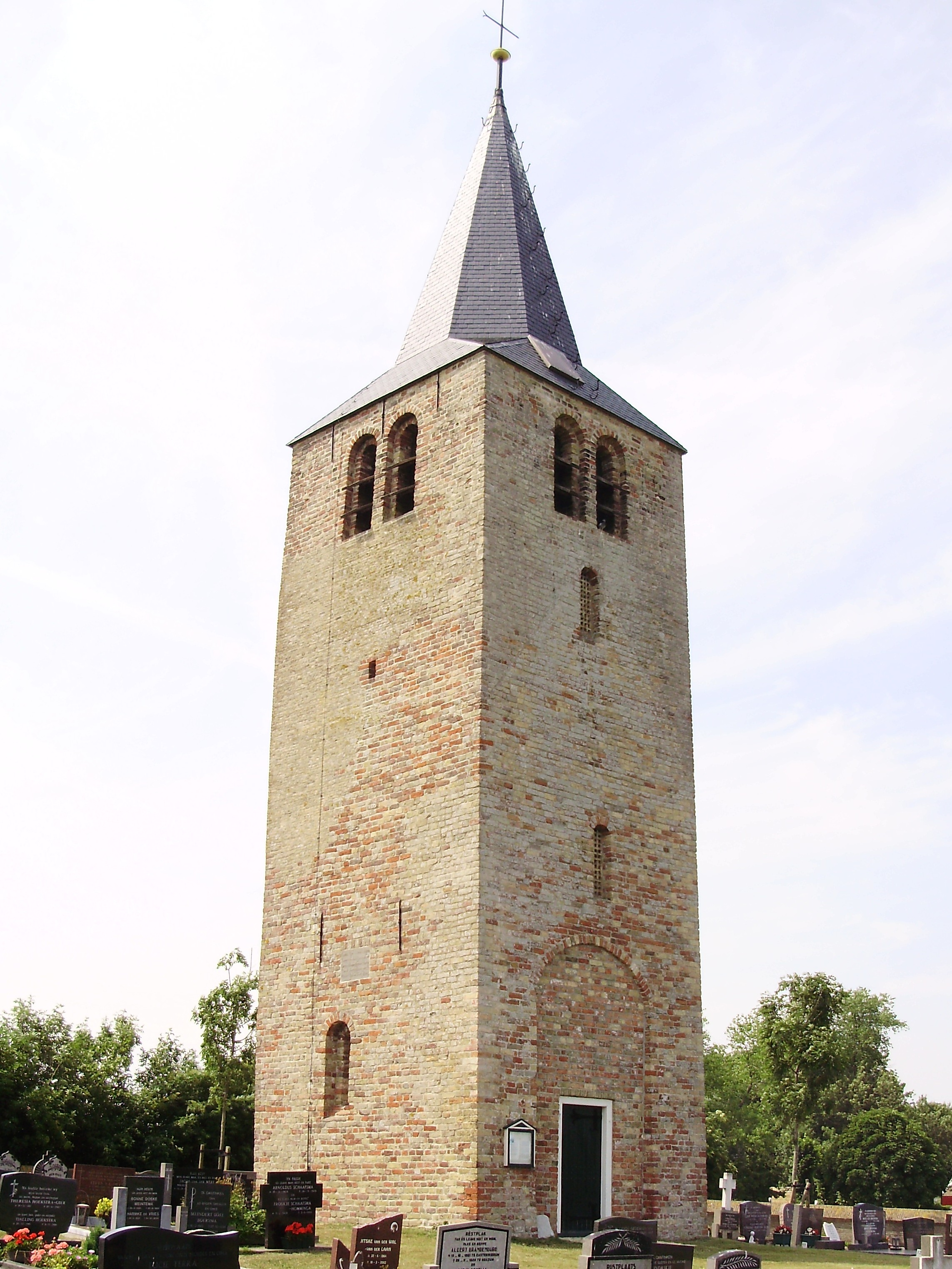 Kerktoren bij Oosterwierum (buurtschap Tsjerkebuorren) in gemeente Littseradeel (provincie Friesland, Nederland)